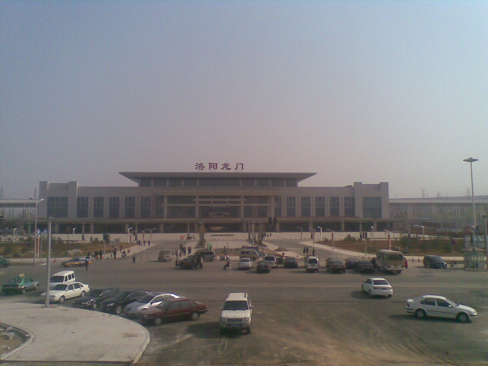 中文（中国大陆）: 洛阳龙门站（洛阳南站）